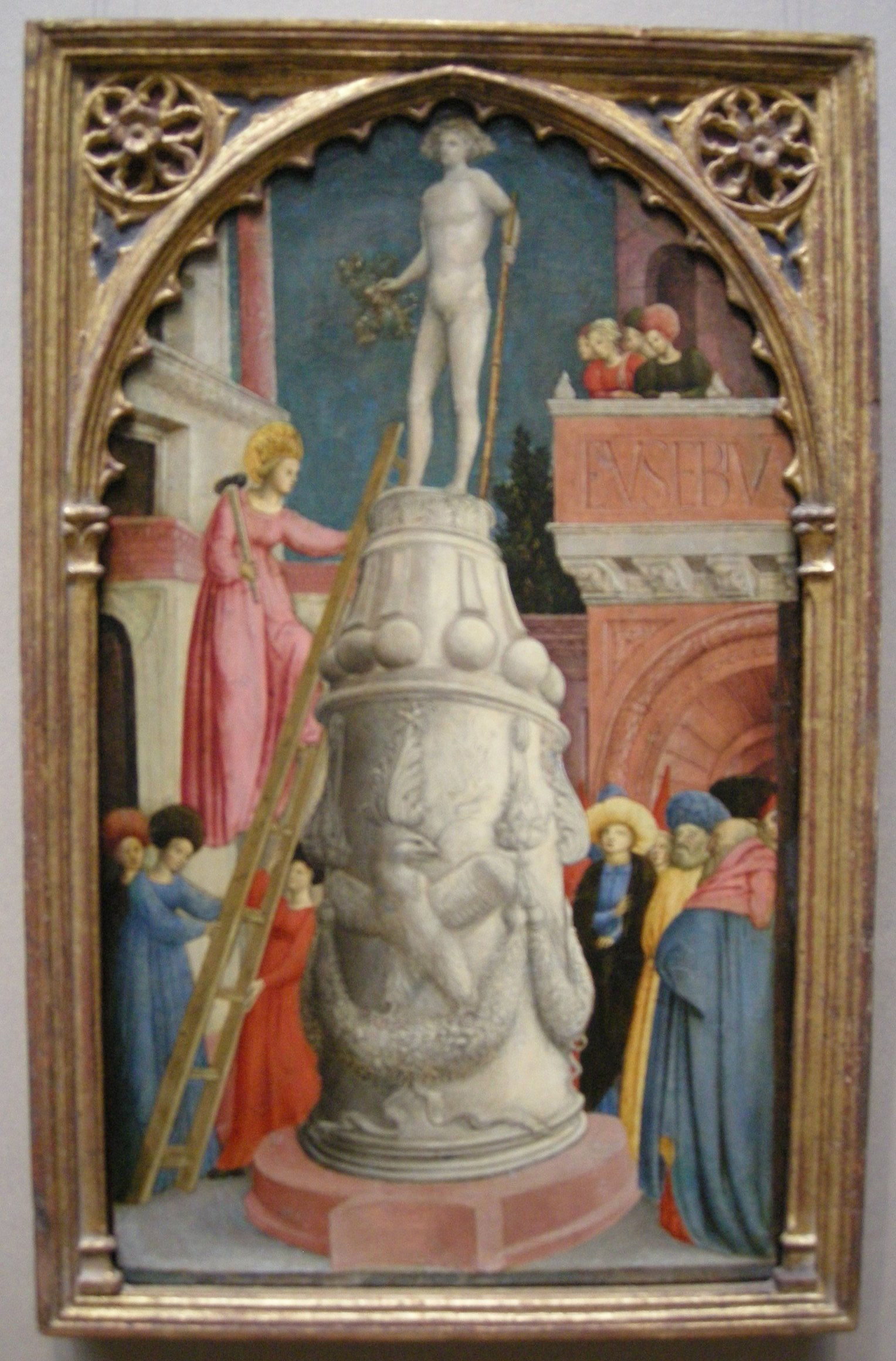 Giovanni d'alemagna, sant'apollonia distrugge un idolo pagano, 1442-45 circa